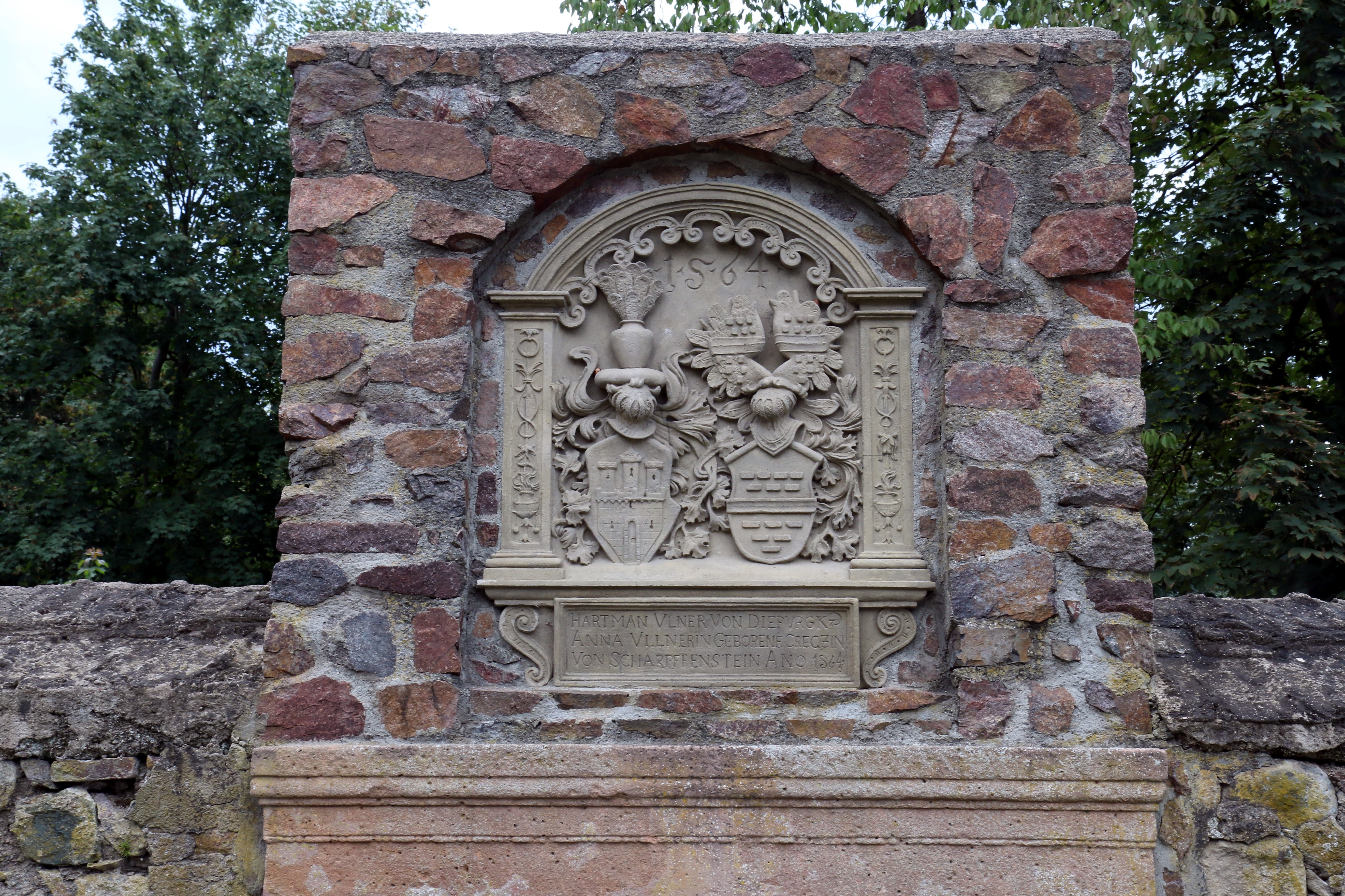 Allianzwappen der Ulner und Kratz von Scharfenstein an der Wasserpforte am Schloss Fechenbach in Dieburg